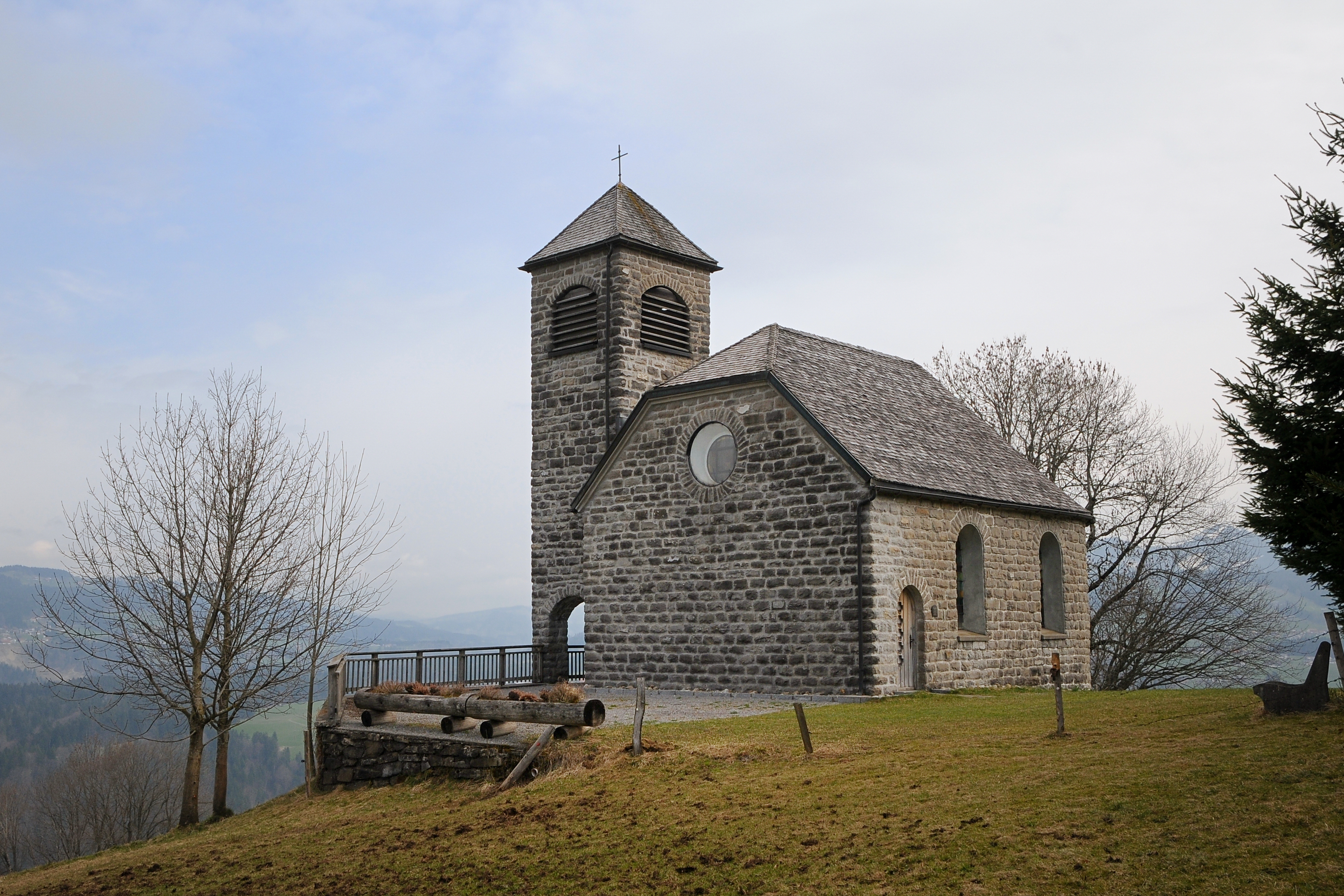 aus dem DEHIO Vorarlberg 1983: Fatima-Kapelle, in Vorholz (Alberschwende. 1953 erbaut; Rechteckbau mit Rundapsis unter Krüppelwalmdach, Nors-Turm mit Kegeldach, an der Südwand Rundbogeneingang und zwei Rundbogenfenster, an der Fassade Rosettenfenster, Innenraum mit offenem Dachstuhl. Am Altar Kruzifixus, an der linken Wand Fatima-Madonna, beide von "Jakob Summer 1983".